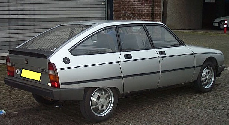 Citroen GSA X1 1984